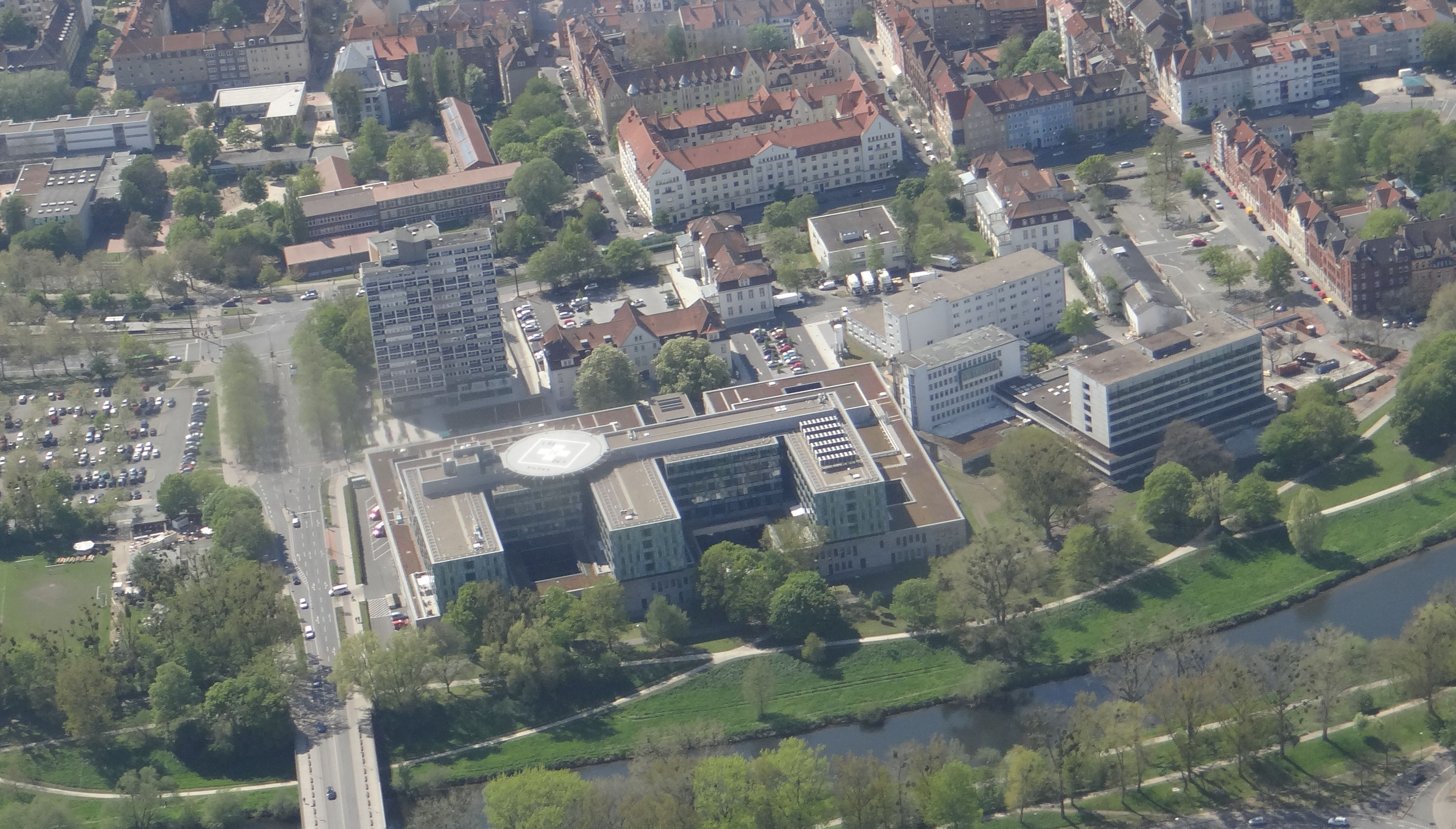 Krankenhaus Siloah Luftbild 5645